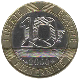 Revers d'une pièce de 10 Francs génie de la Bastille